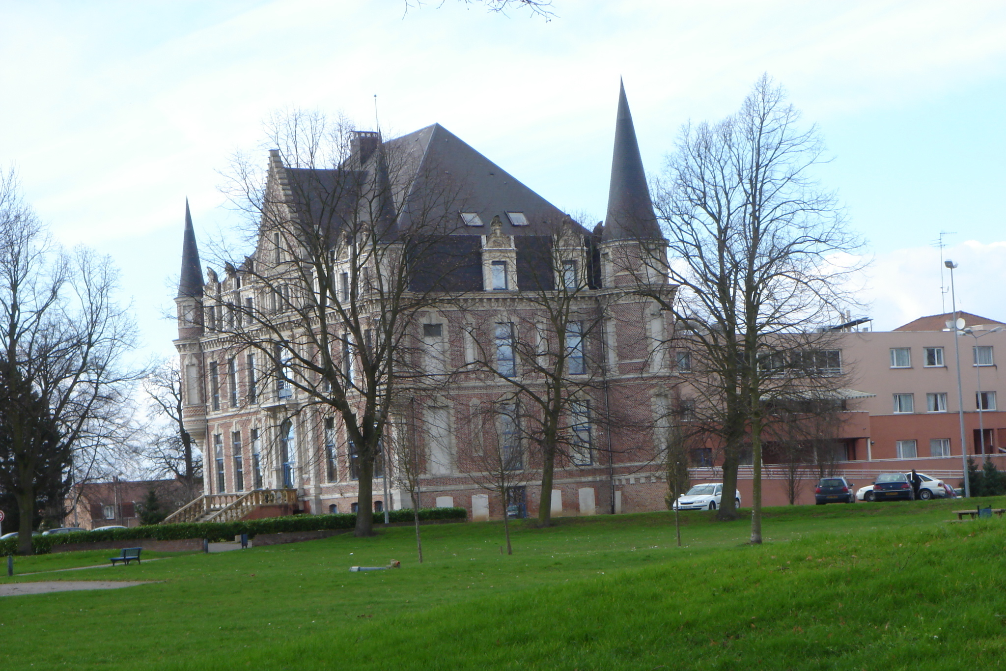 Le chateau Lambrecht de Montigny-en-Ostrevent